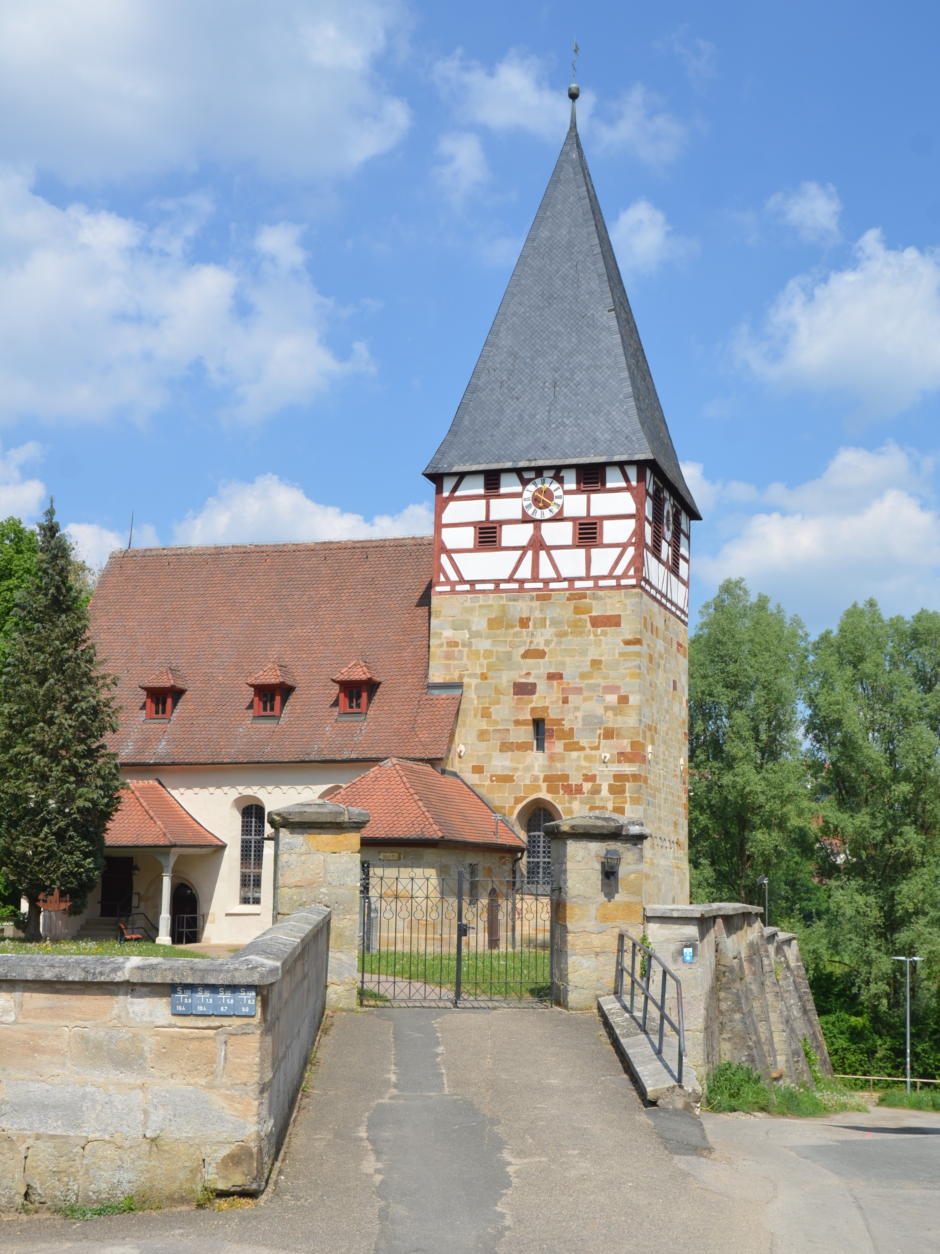 Kirche St. Michael in Rasch